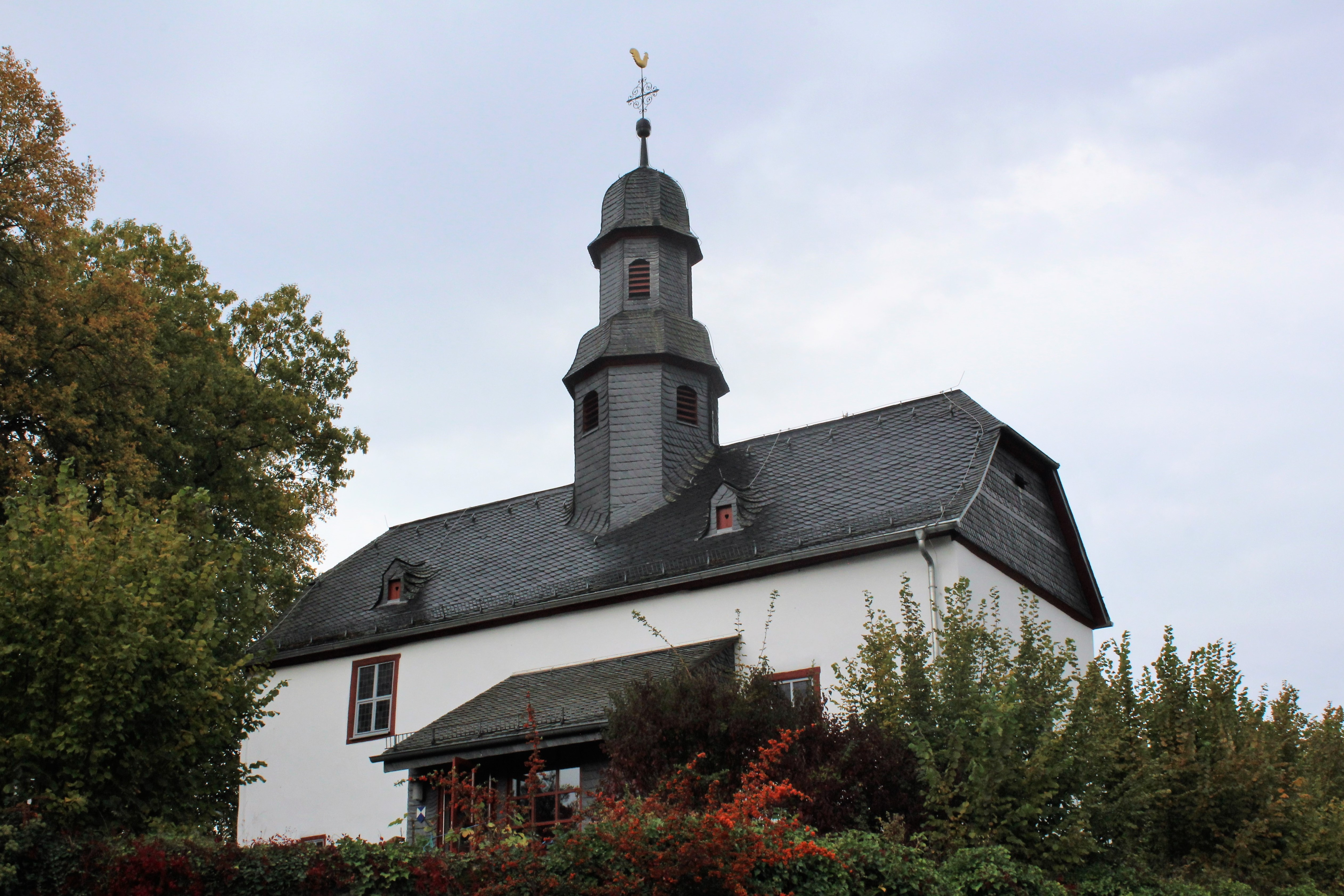 Evangelische Kirche Blasbach, Wetzlar, Lahndillkreis, Hessen, Deutschland